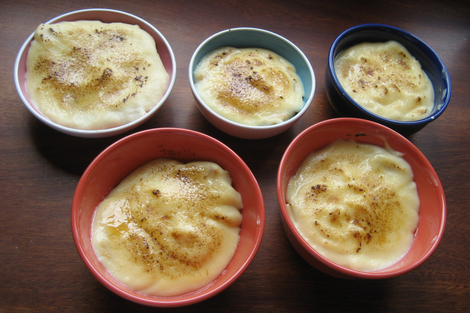 Goxua, typical basque dessert.